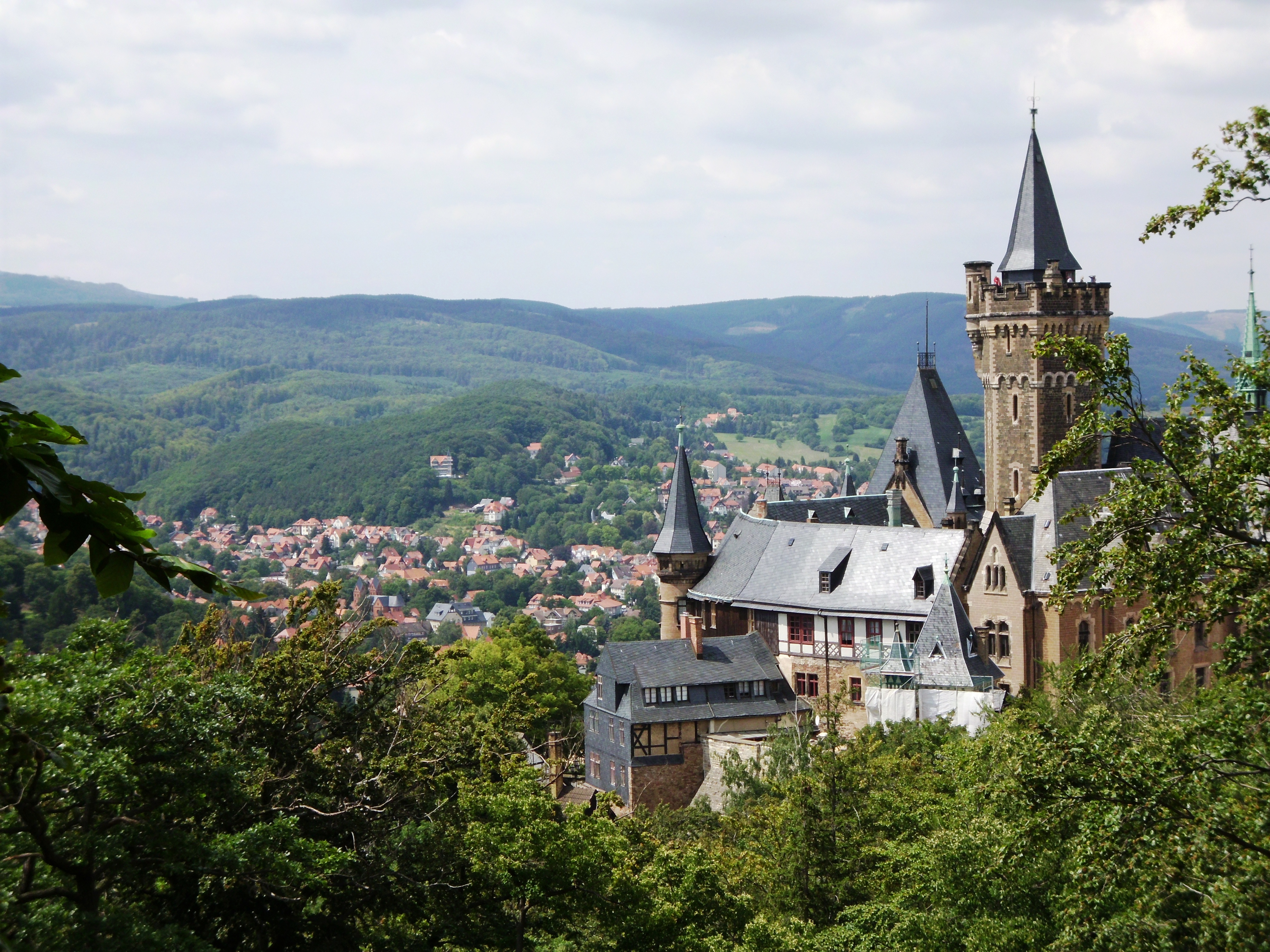 Blick auf Wernigerode und das Wernigeröder Schloss vom Agnesberg